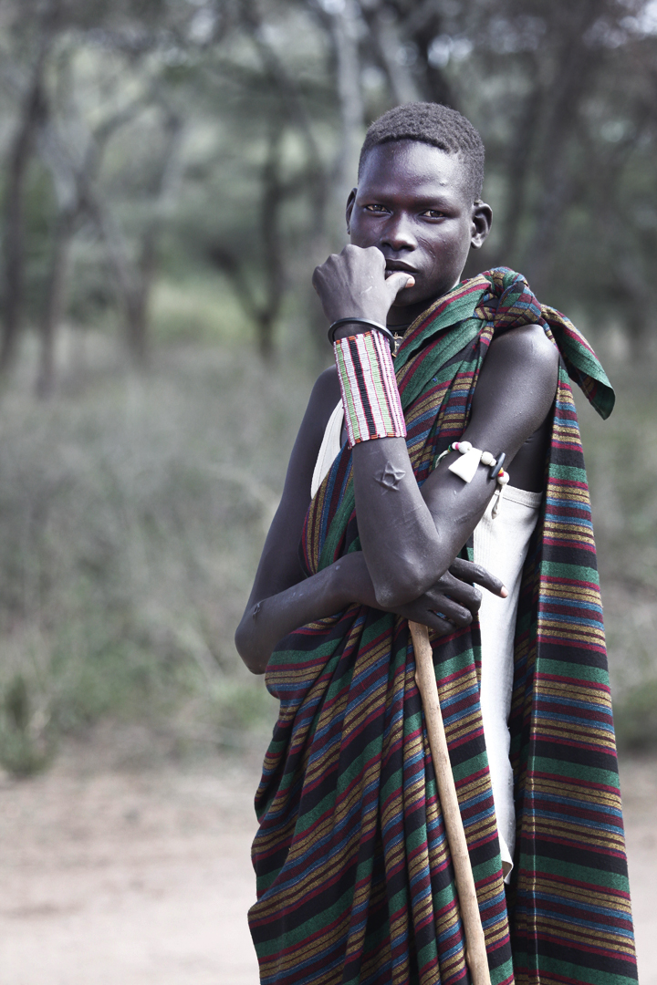 Young Toposa man in South Sudan